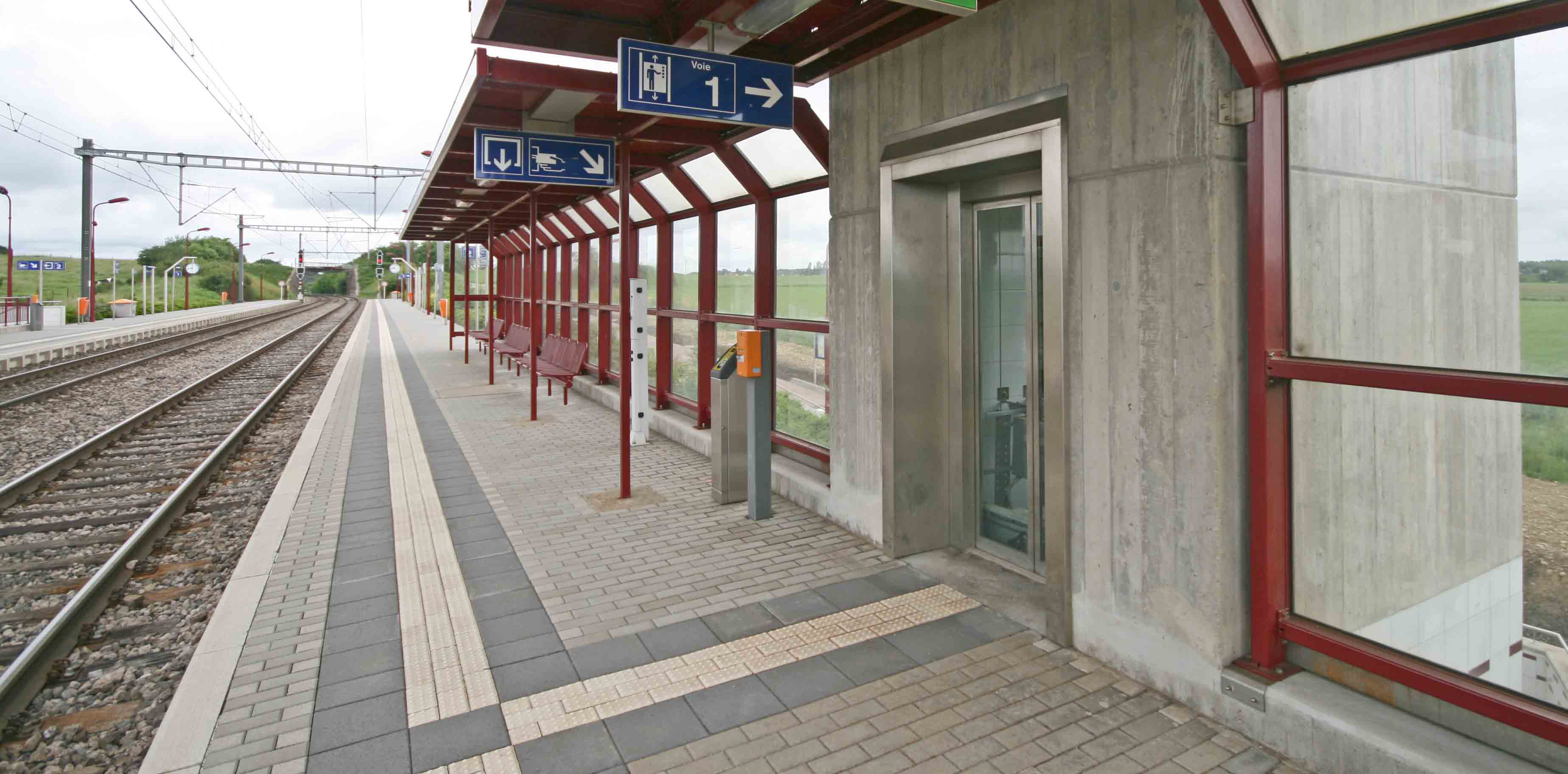 Lift beim Quai vun der Gare Mamer Lycée.